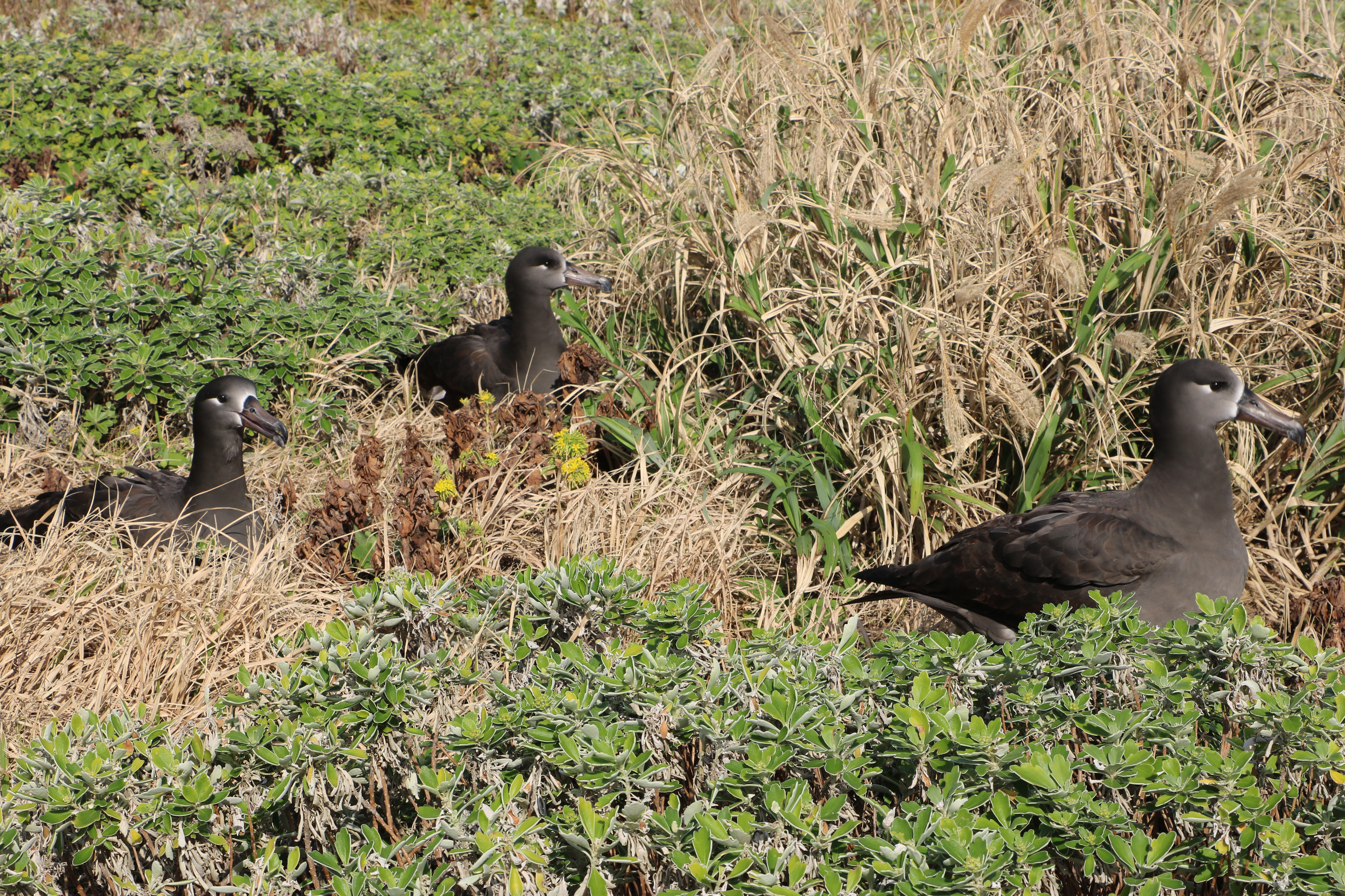 八丈小島のクロアシアホウドリと生息地